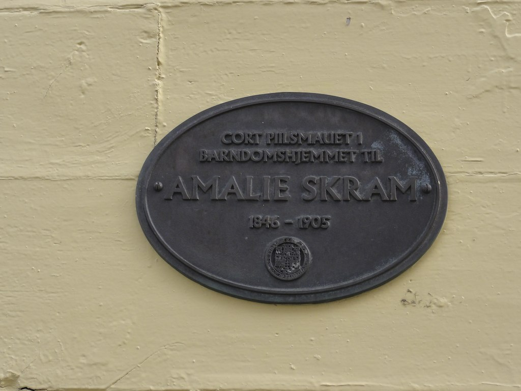 Barndomshjemmet il Amalie Skram